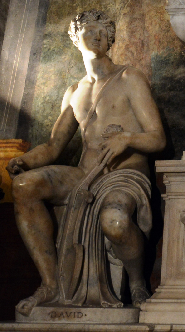 Tomba Sannazzaro, Napoli